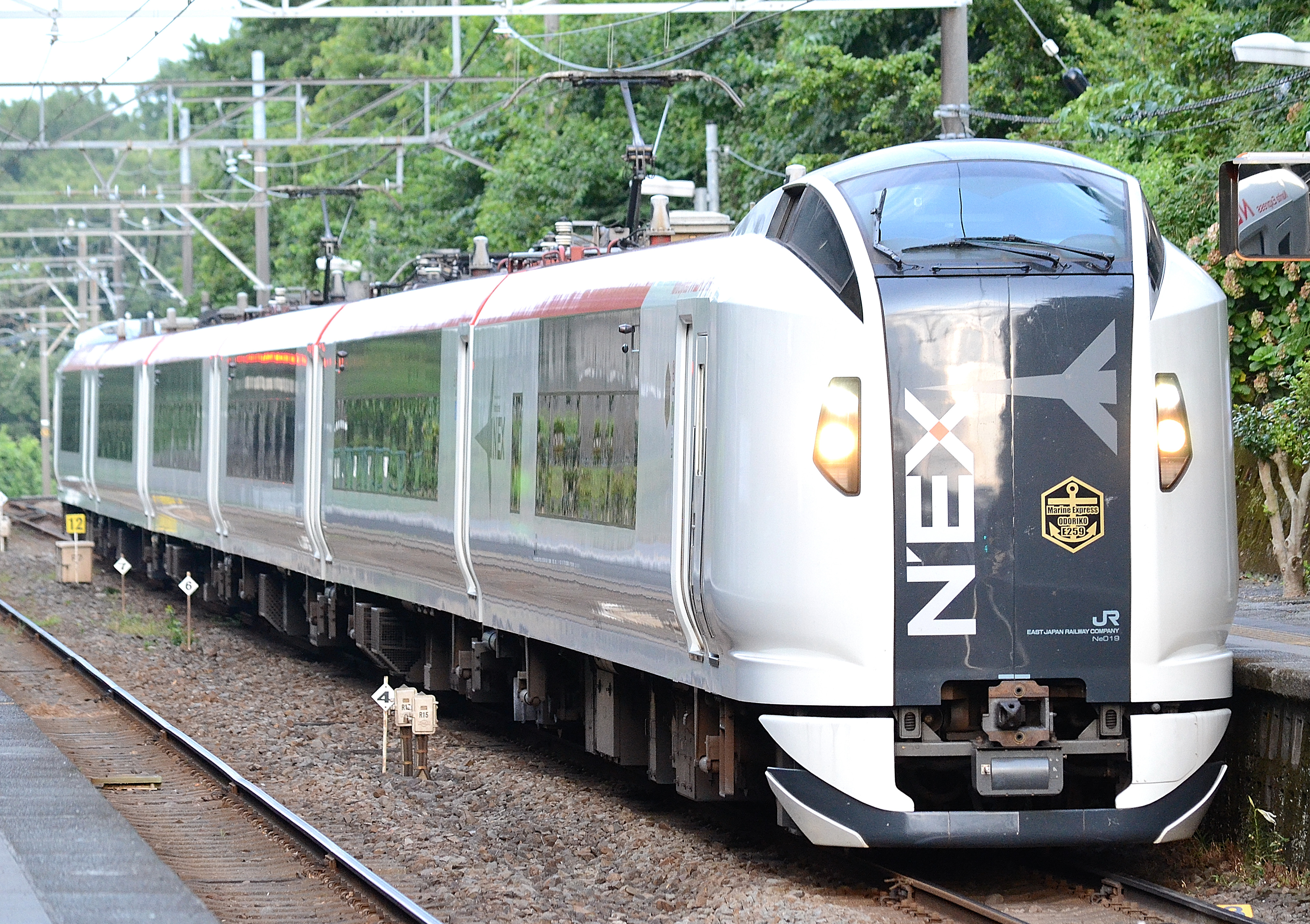 伊豆急行線 川奈駅を通過する E259系「マリンエキスプレス踊り子」号